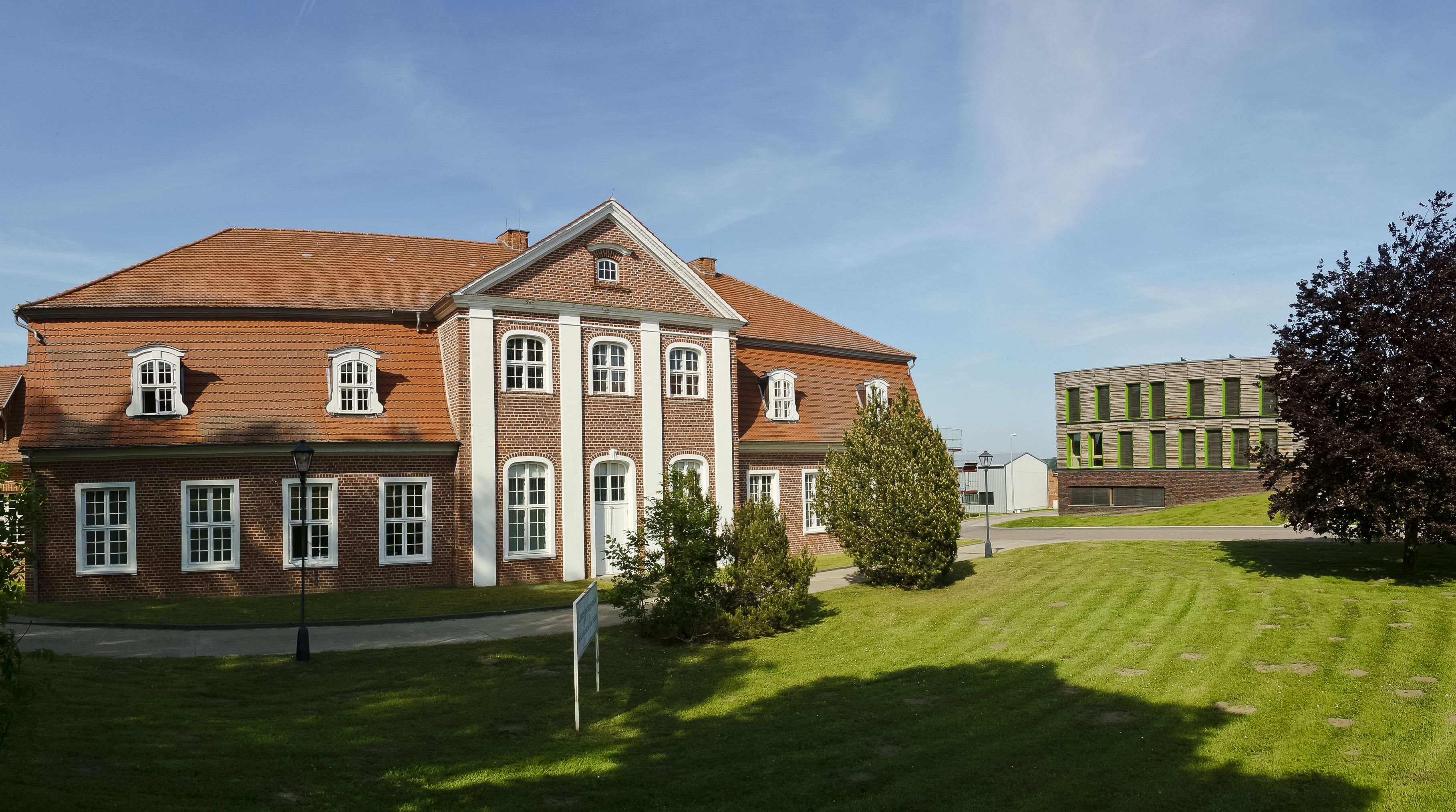 FNR Gutshaus und Neubau